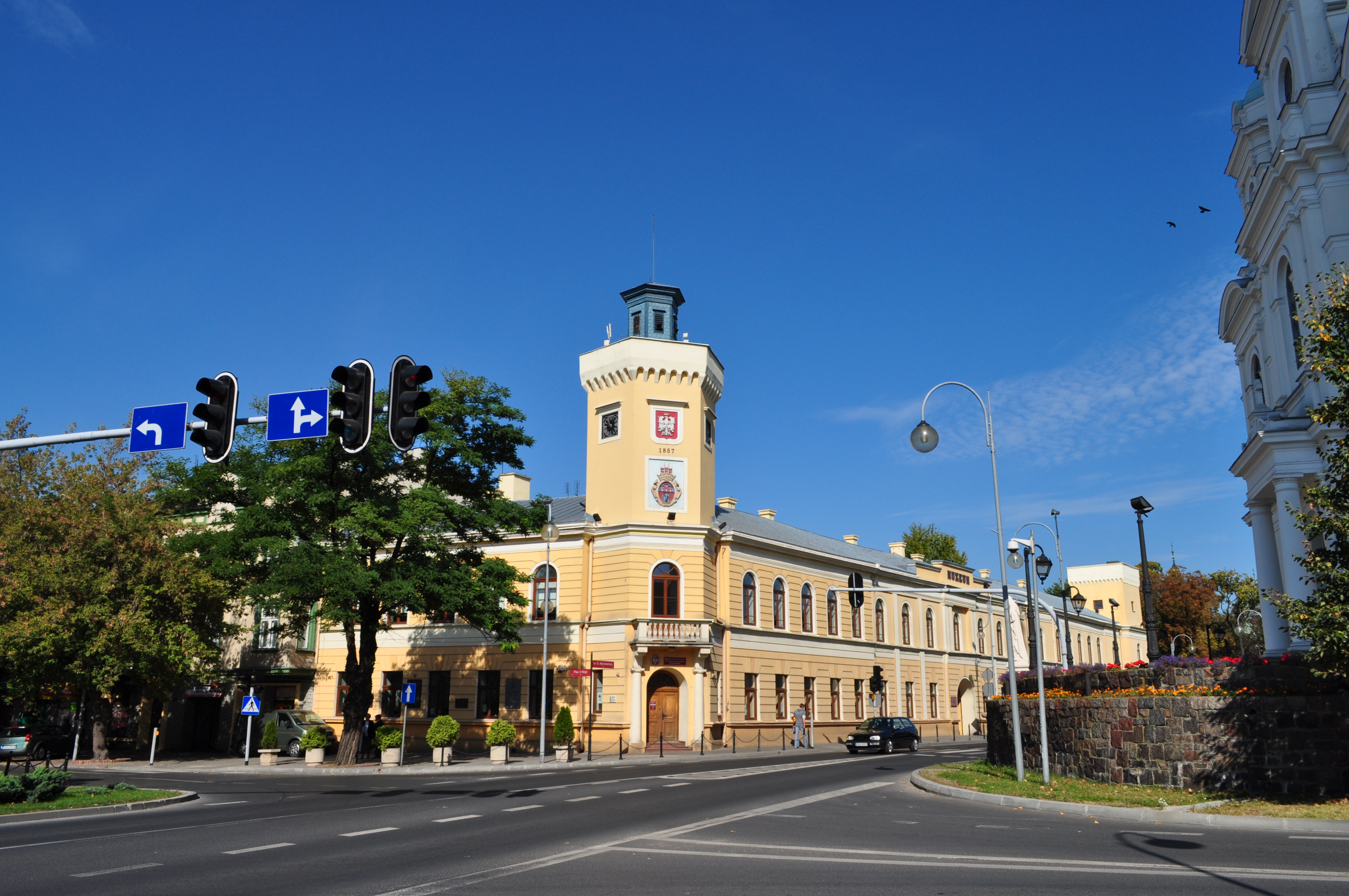 Ratusz w Radomsku